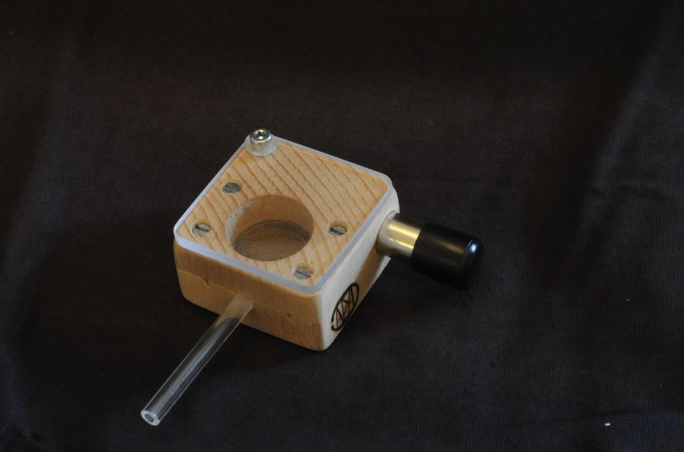 Vaporizzatore portatile conduzione termica